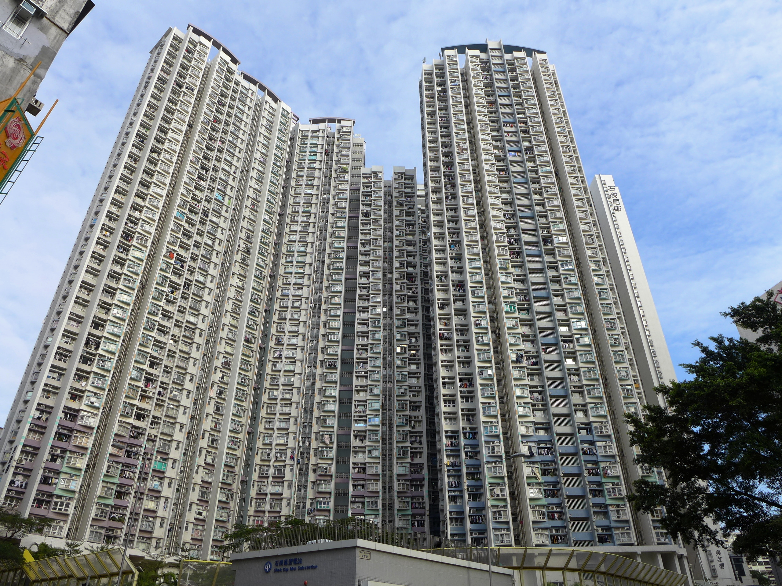 Shek Kip Mei Estate Mei Ying House & Mei Yue House